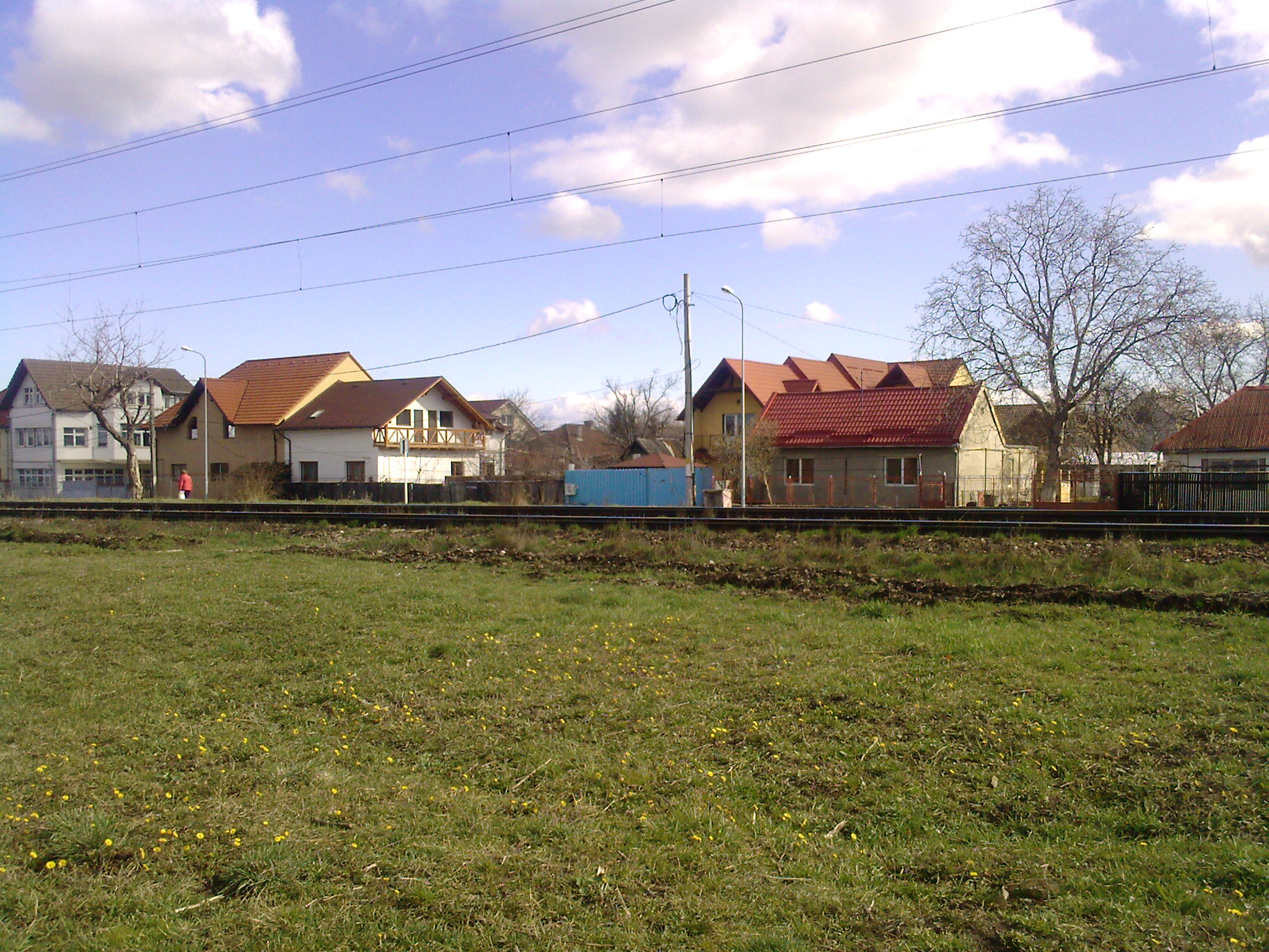 Quartier Craiter, Braşov, România